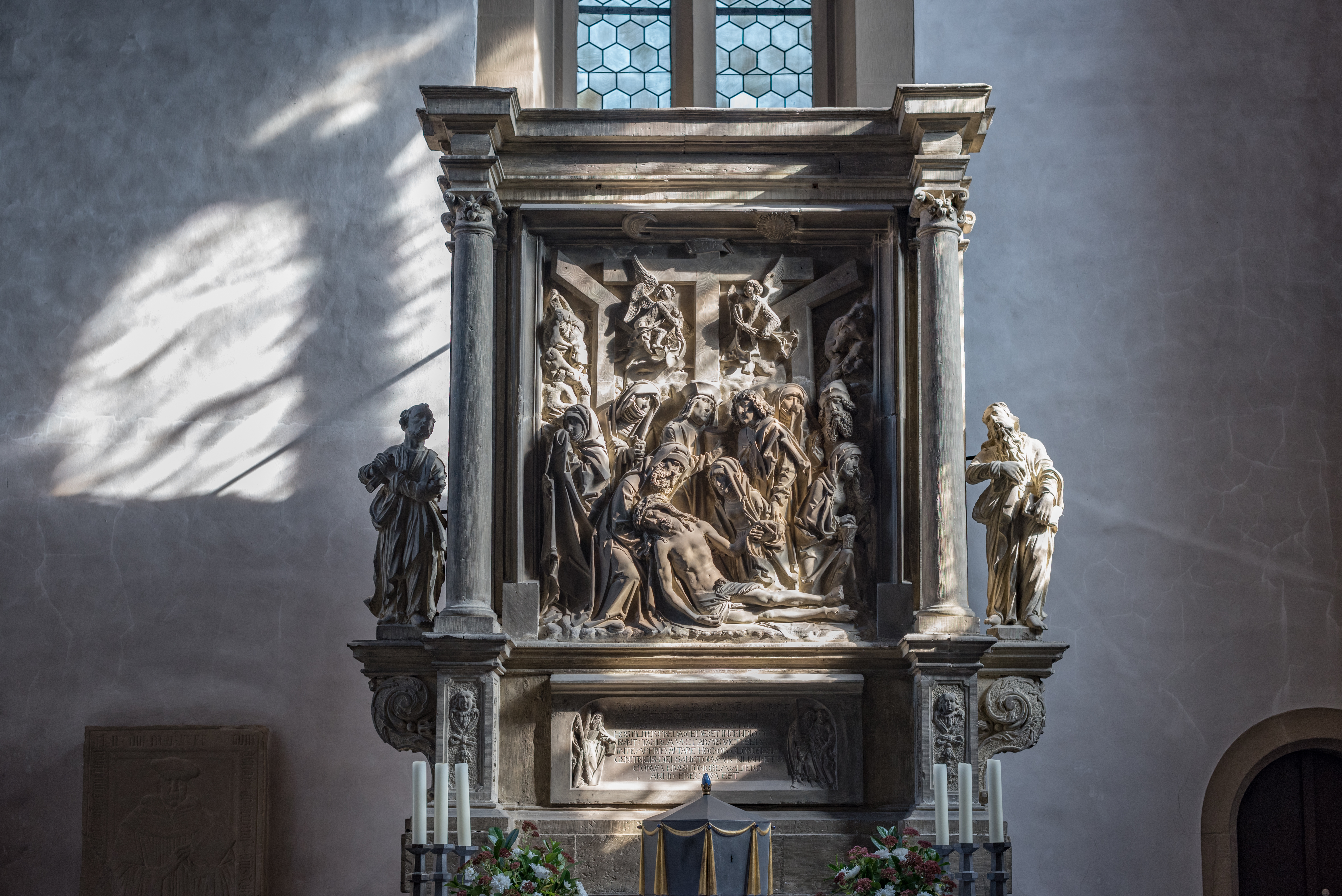 Rimpar, Kath. Kuratiekirche St. Afra, Riemenschneideraltar, Maidbronn